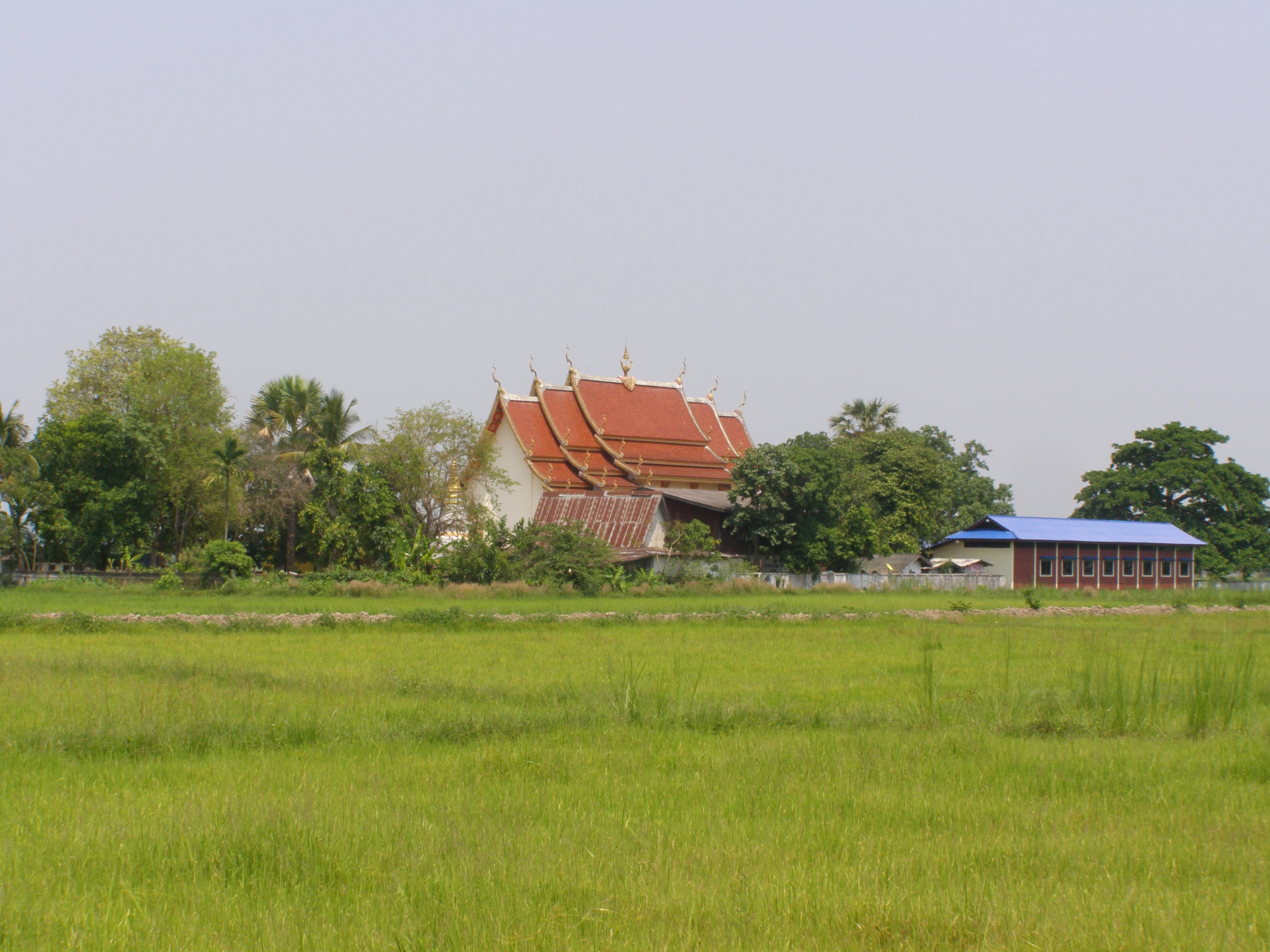 Wat Ban Suree